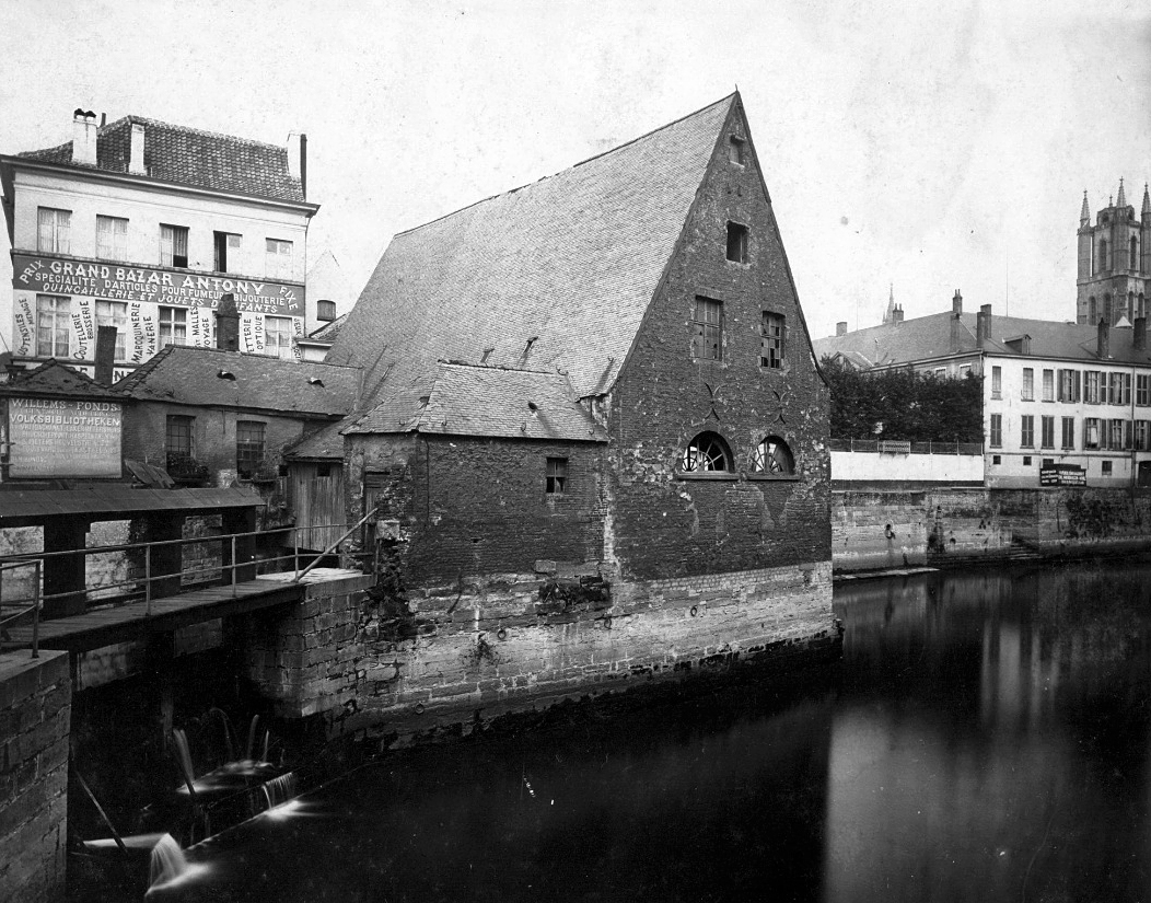 Watermolen op de Nederschelde (nu François Laurentplein) te Gent - afgebroken in 1884